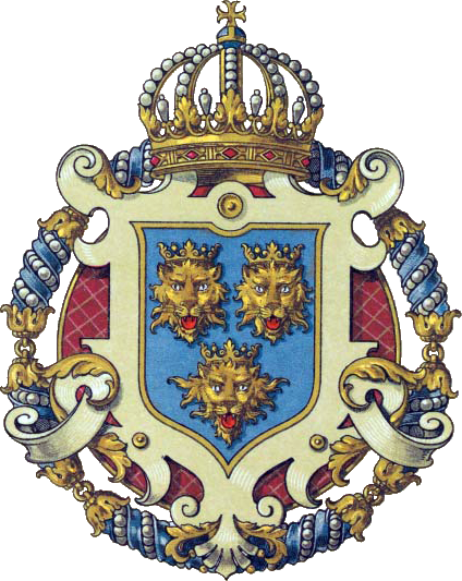 Wappen des Königreichs Dalmatien